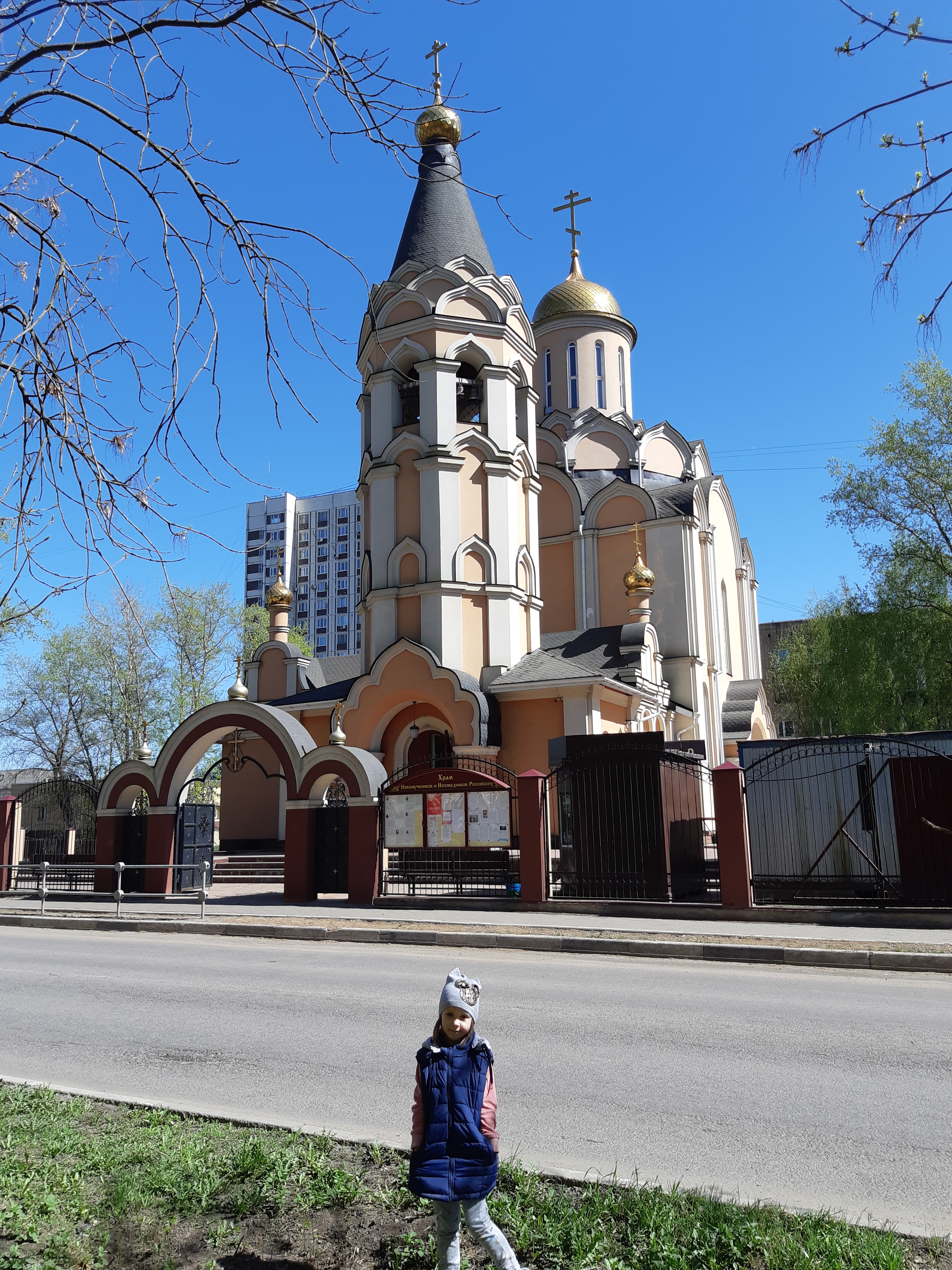 Собор новомучеников и исповедников Церкви Русской. Кучино вс, 28 апреля 2019 года.